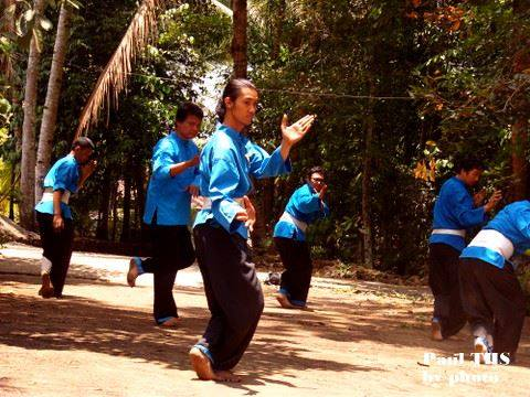 gambar latihan para pesilat THS